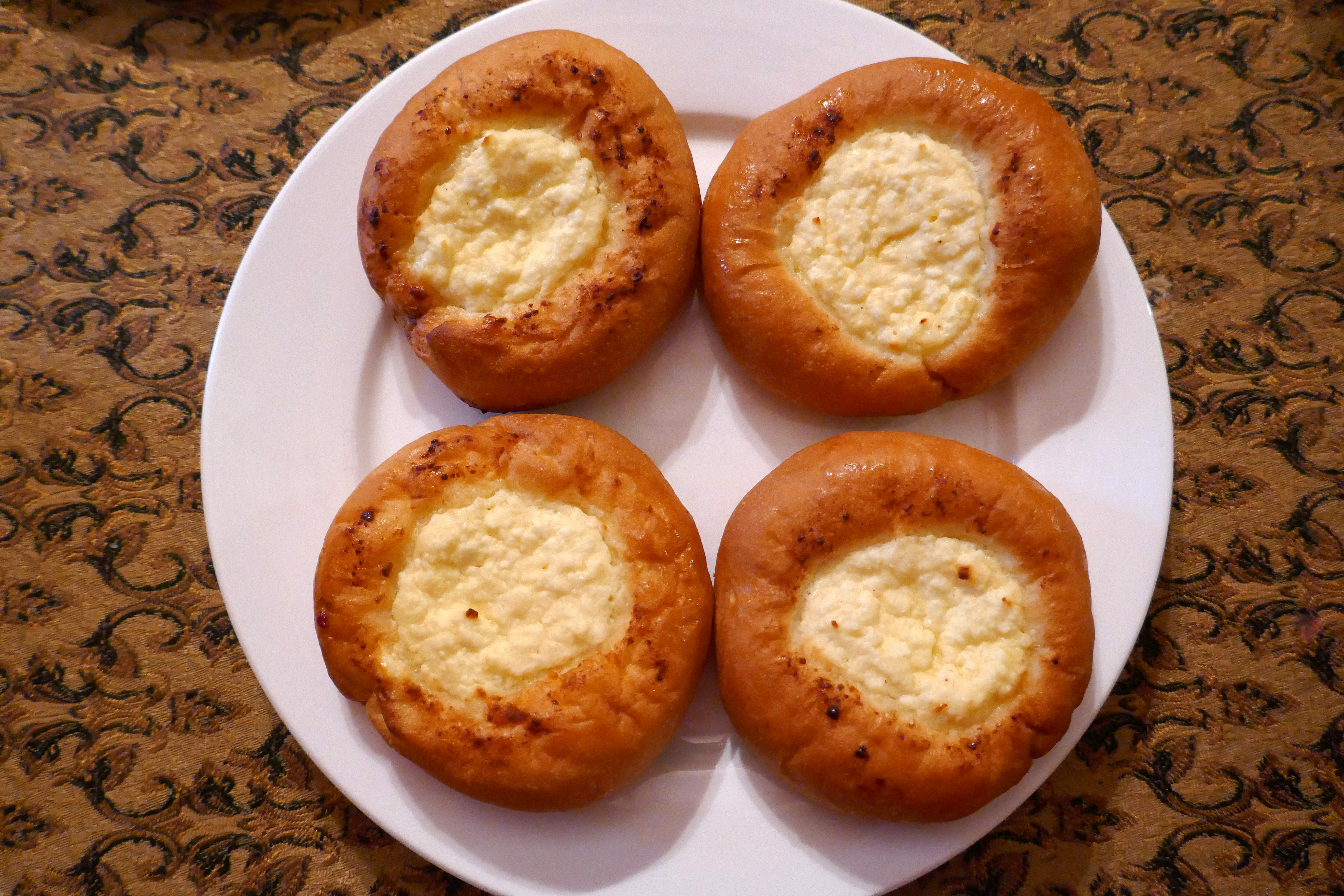 Vatrouckas servis à Novgorod (Russie).